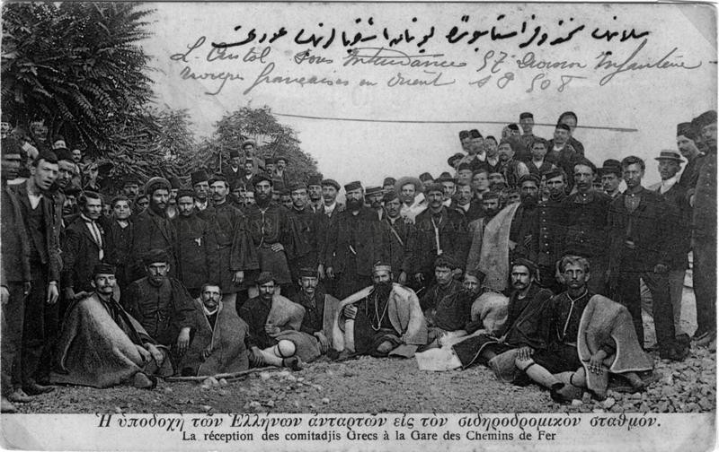 Посрещане на солунската гара на освободените от Битолския затвор 120 гръцки андарти, сред които Стилианос Клидис и Йоанис Доксоянис (седнал, шести от ляво на дясно, с гъста брада